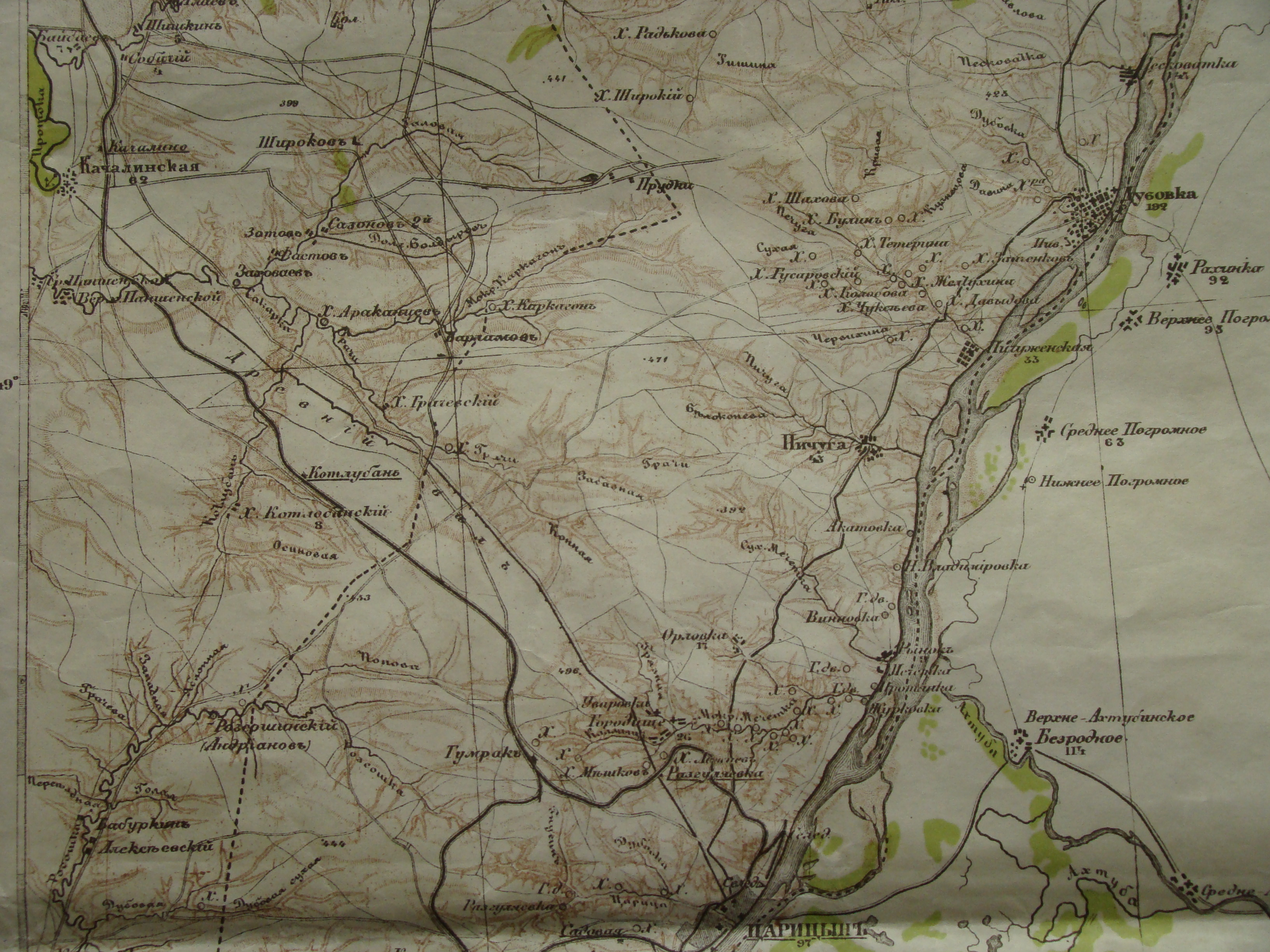 Карта .Стрельбицкого 1874 год лист 94-a3 Верх современного Волгограда